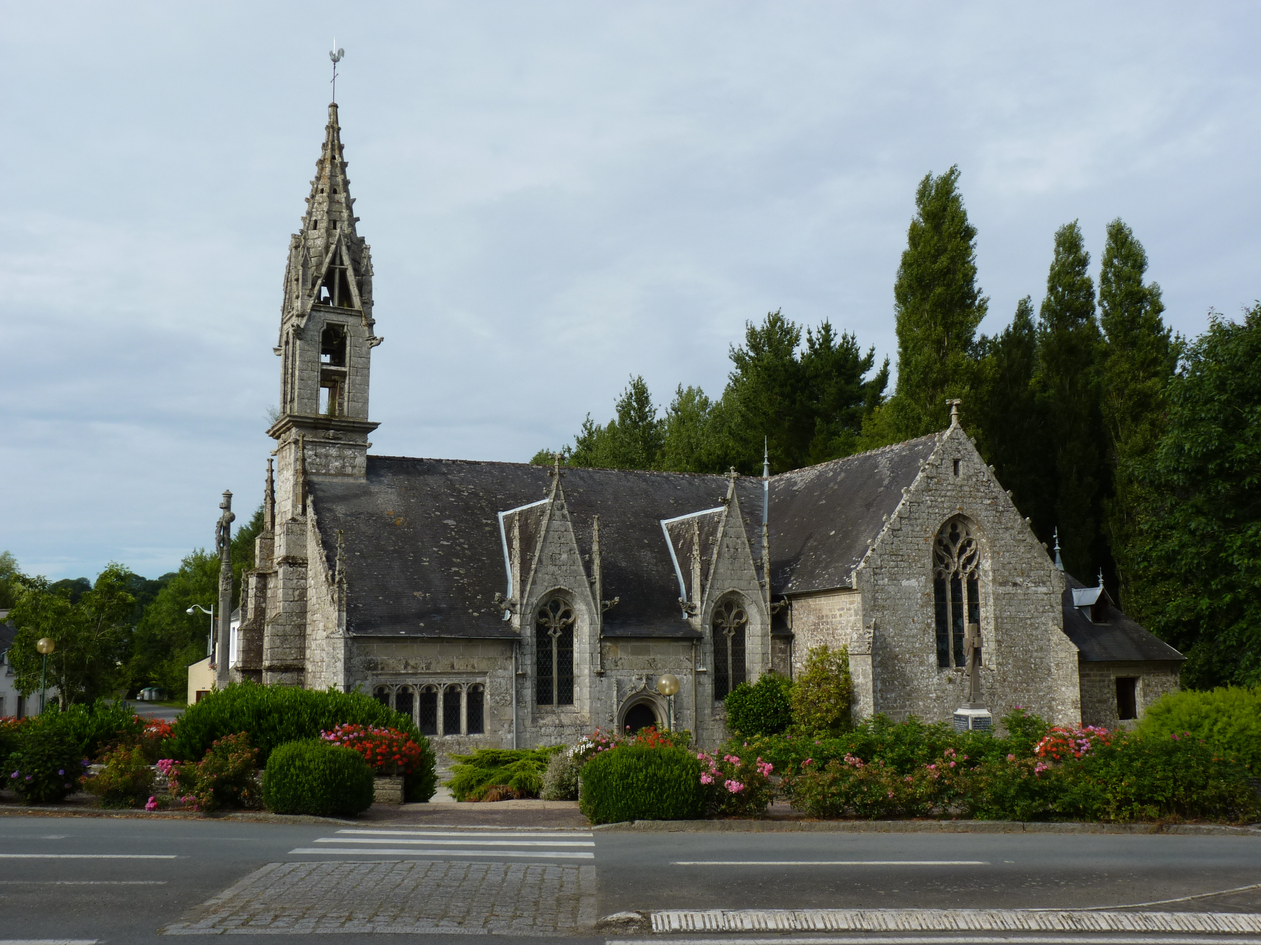 Église du 16ème siècle avec ossuaire.